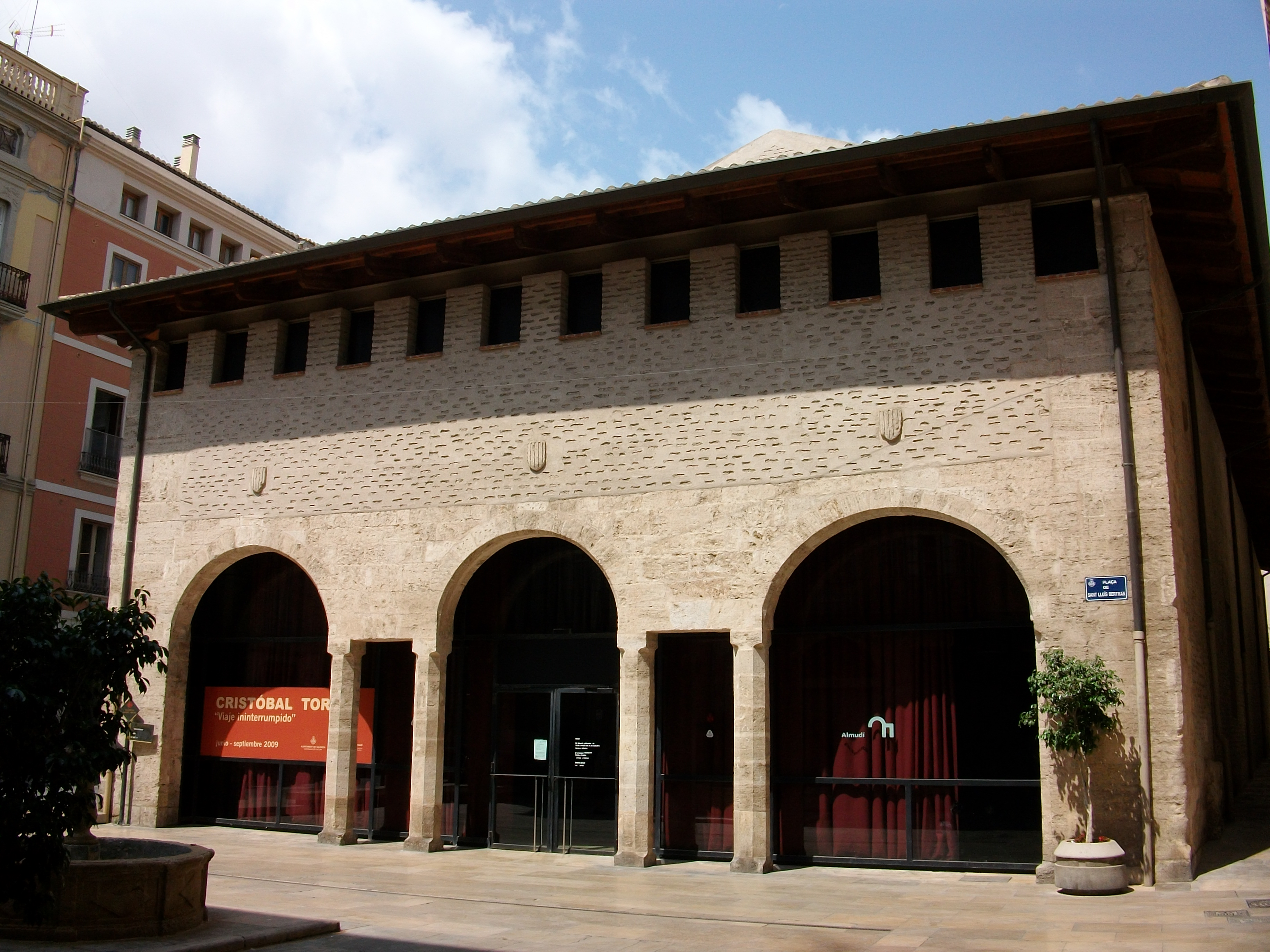 Almodí de València, abans magatzem de blat, ara sala d'exposicions.